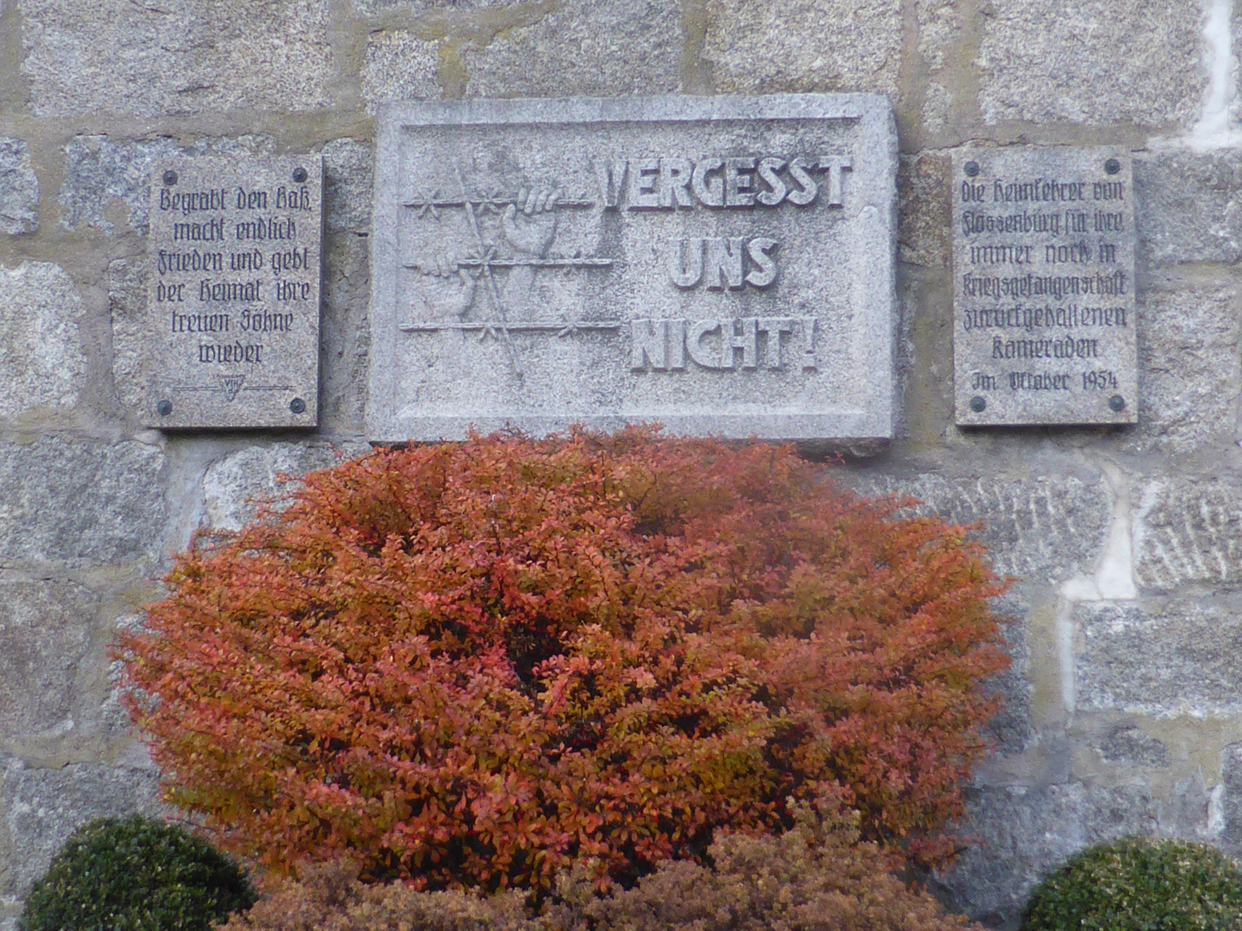 Katholische_Pfarrkirche_St._Pankratius_(Flossenbürg)